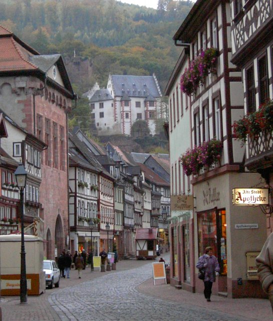 Beschreibung: Miltenberg Altes Rathaus und Mildenburg 2003 Quelle: fotografiert am 25.10.2003 Fotograf: Matthias Schüssler Andere Versionen: Lizenzstatus: GNU FDL